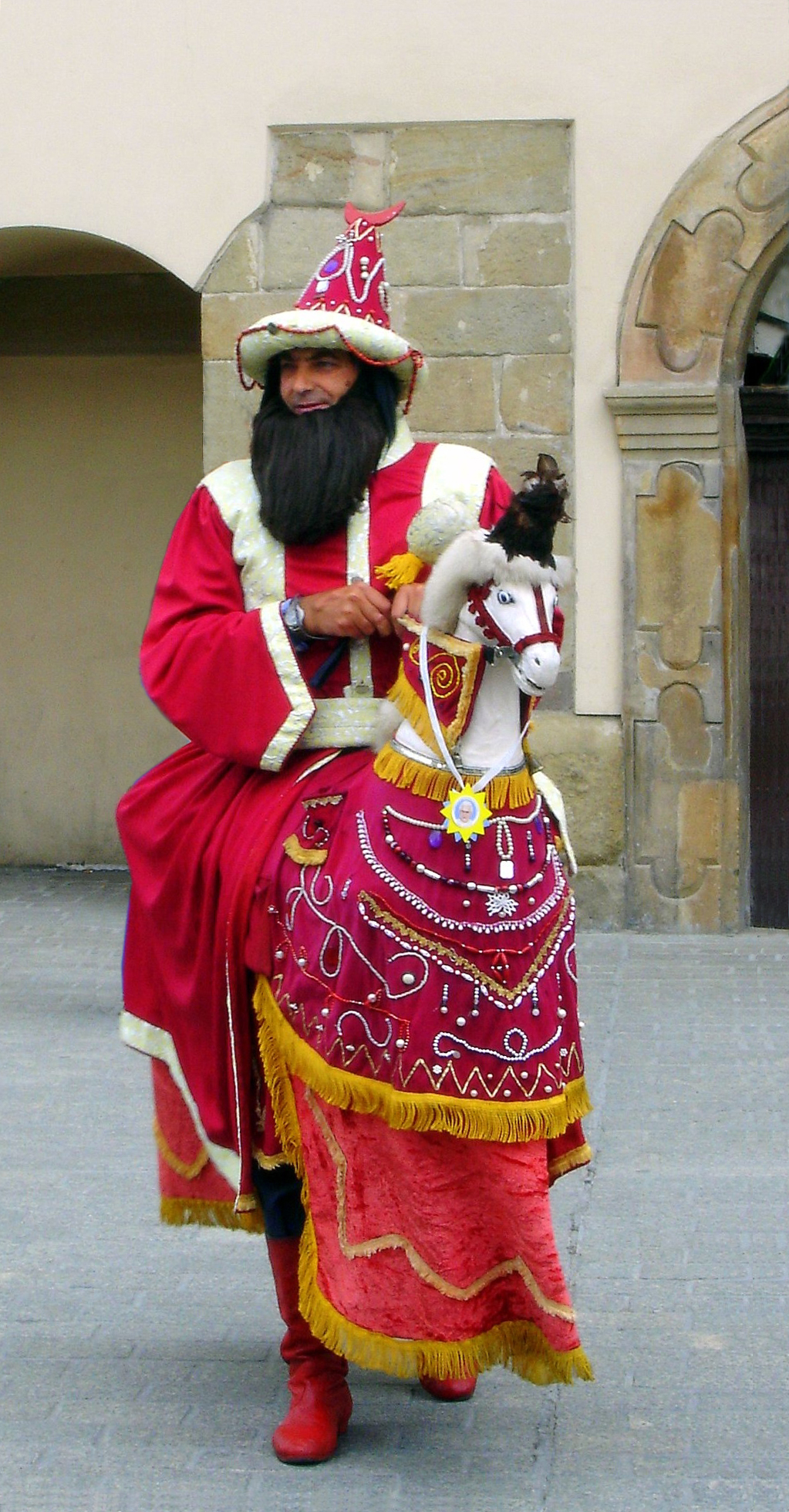 Lajkonik. Kraków, Poland